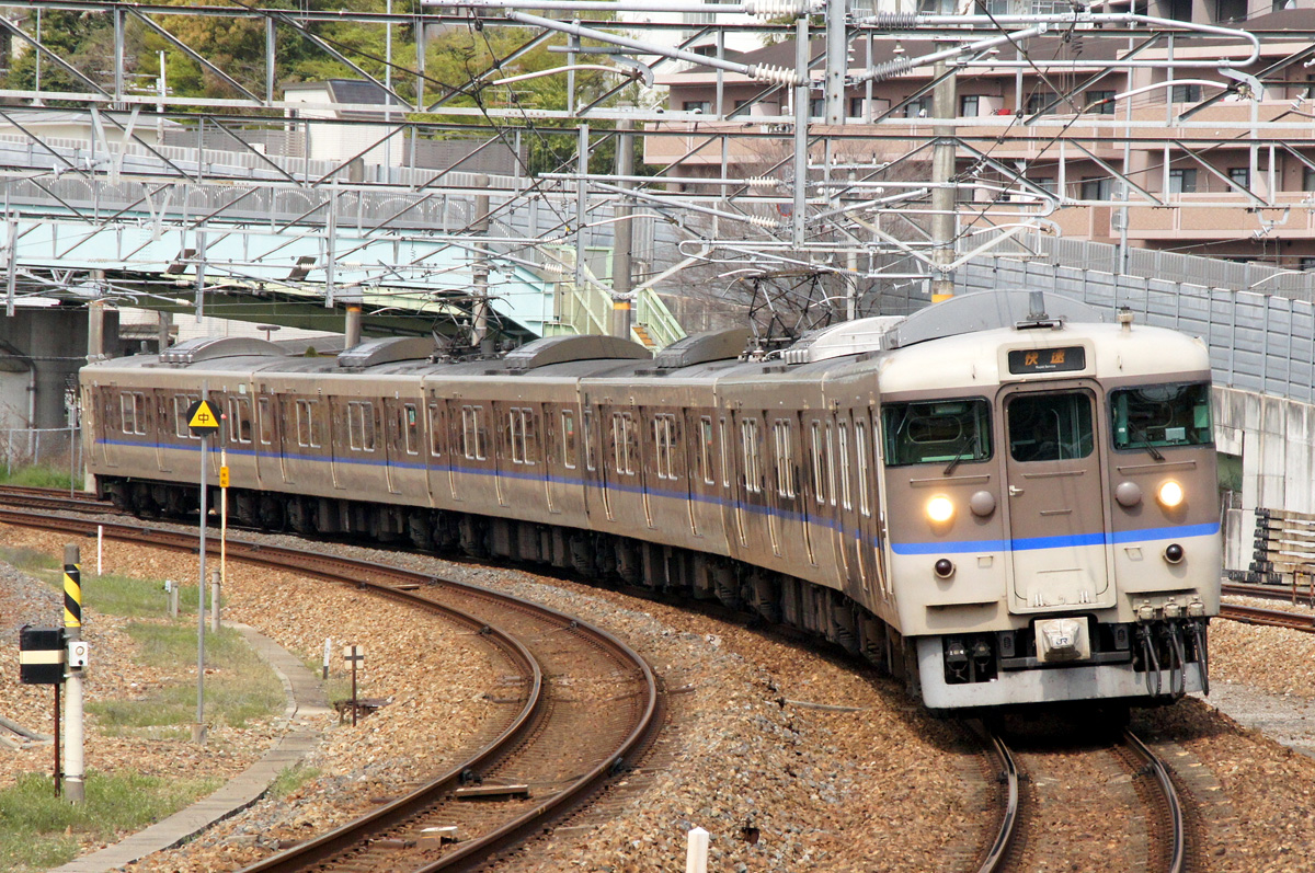 JR西日本113系（JR宝塚線）